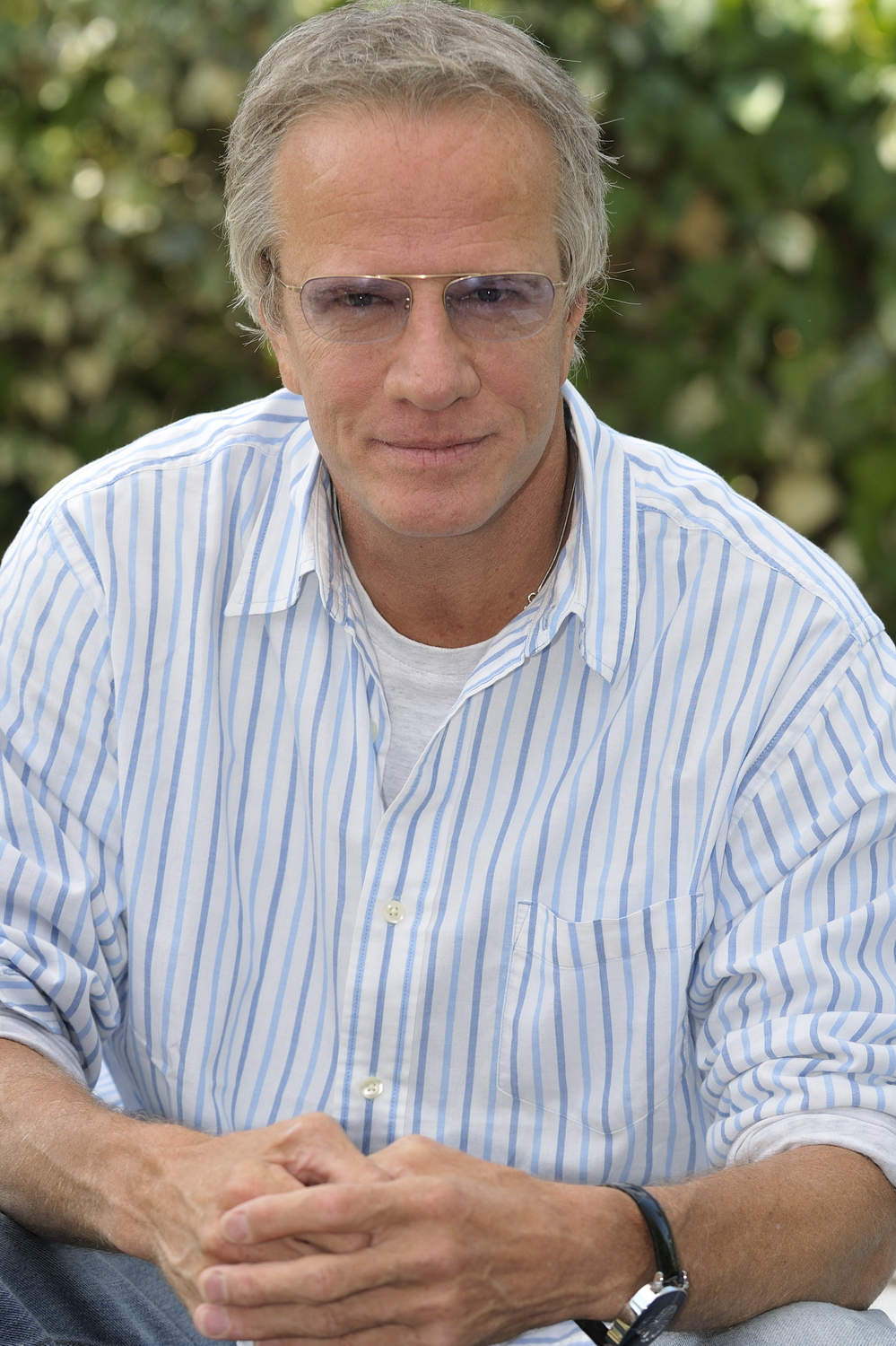 66ème Festival du Cinéma de Venise (Mostra), 6ème jour (07/09/2009) Portrait de Christophe Lambert juste avant l'interview de Laurent Pecha pour site